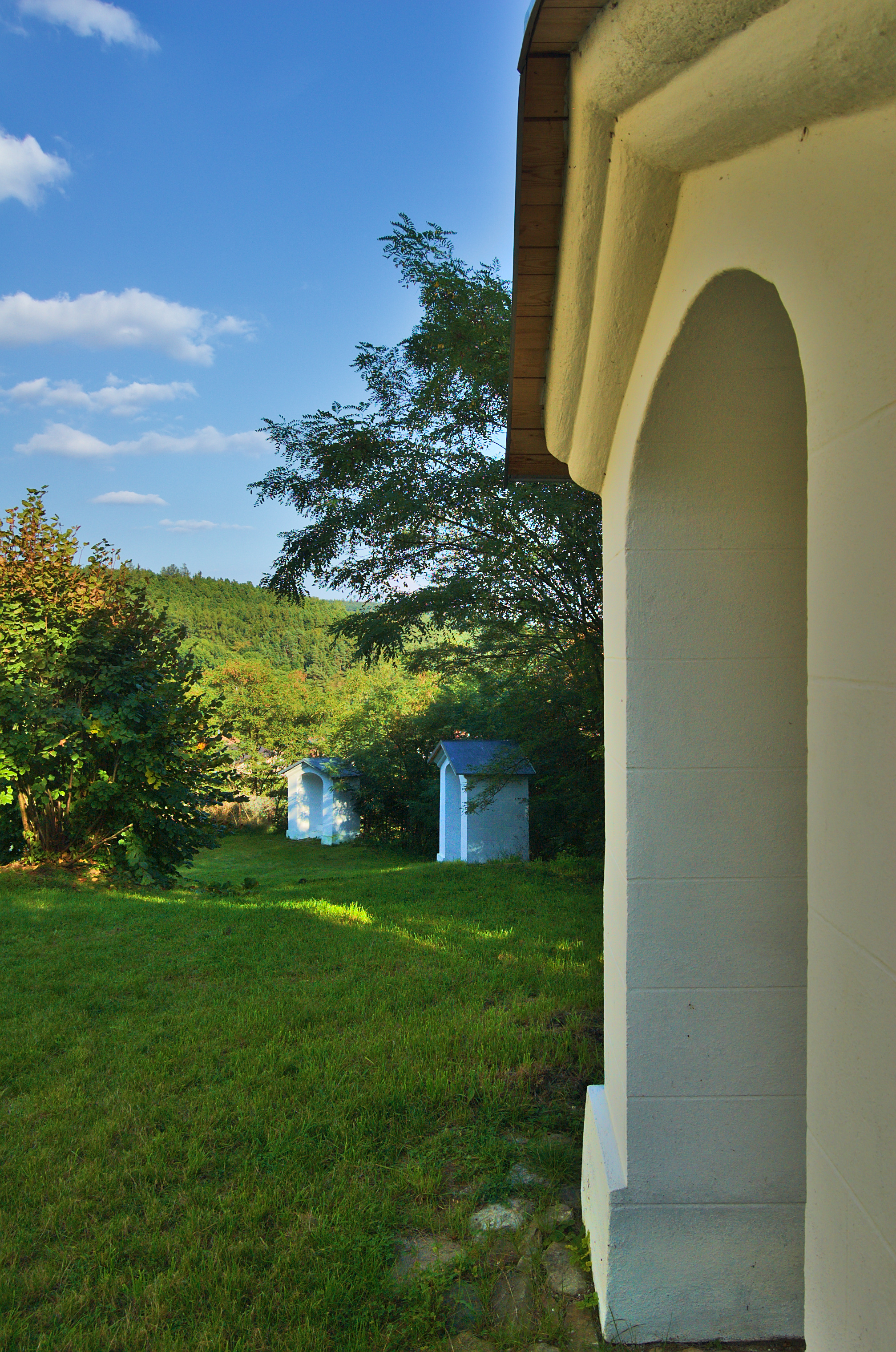 Křížová cesta u kostela Andělů Strážných, Stražisko, okres Prostějov